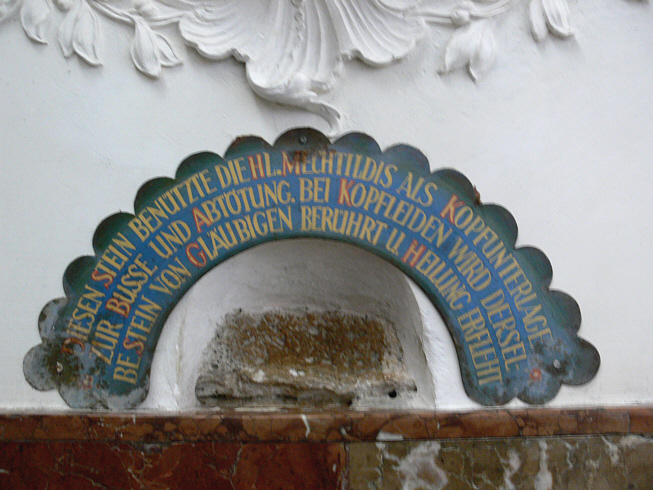 Marienmünster Dießen (ehem. Augustiner-Chorherren-Kirche Mariä Himmelfahrt, heute Pfarrkirche, Dießen am Ammersee) Mechthilidsstein in der Vorhalle (der Legende nach von der sel. Mechthildis († 1160) berührt)